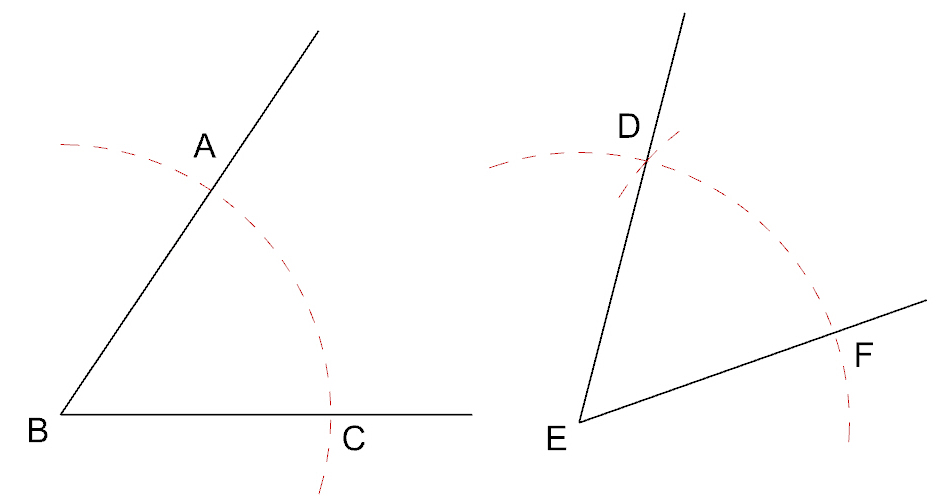 Transporte de ângulos do desenho geométrico